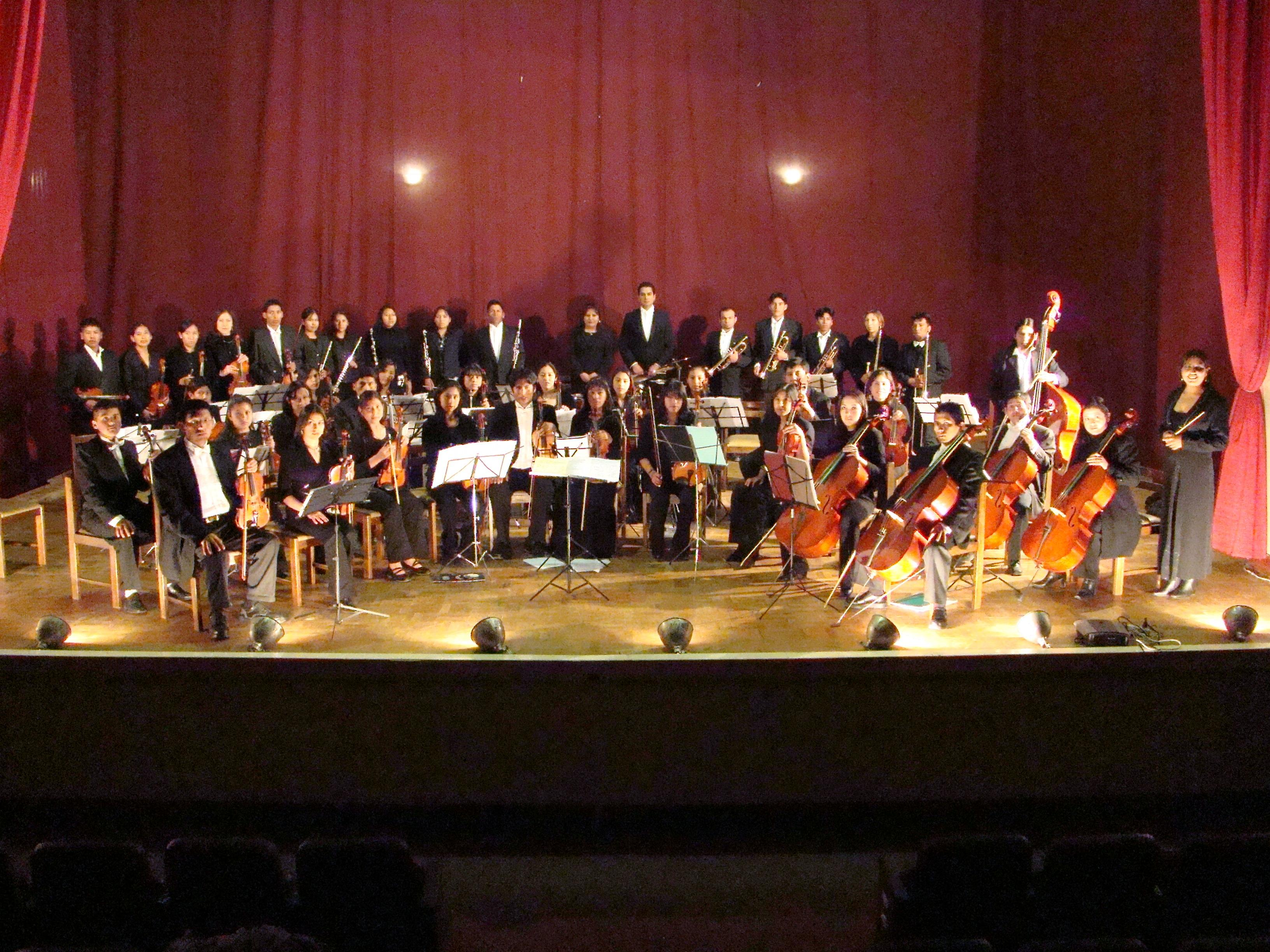 Fotografía de la Orquesta Sinfónica Juvenil de Oruro, en el Teatro de la Casa Municipal de Cultura de Oruro-Bolivia.